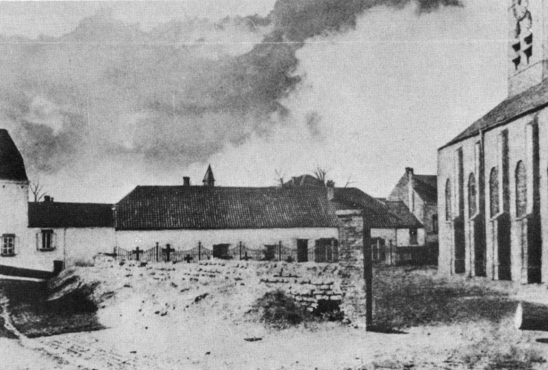 Le vieux cimetière d'Evere pendant sa démolition en 1893